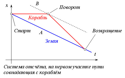 Парадокс близнецов с точки зрения инерциальной системы отсчёта, на первой половине пути совпадающей c удаляющимся кораблём.